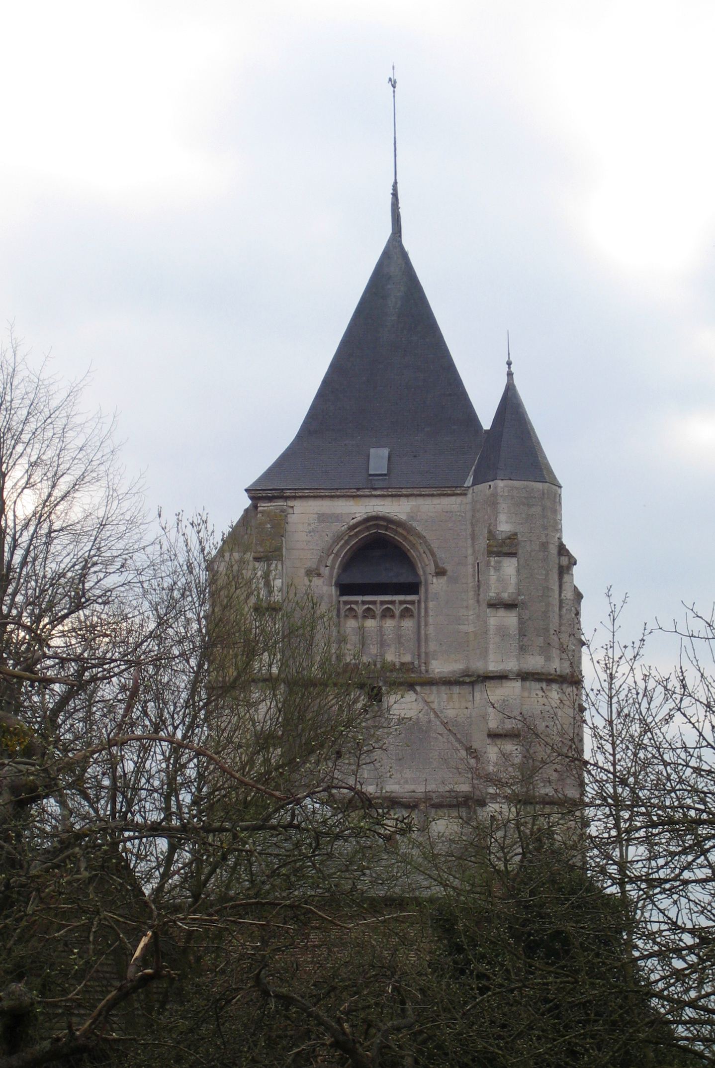 Saint-Maulvis (Somme, France) Le clocher de l'église vu depuis des jardins et vergers.